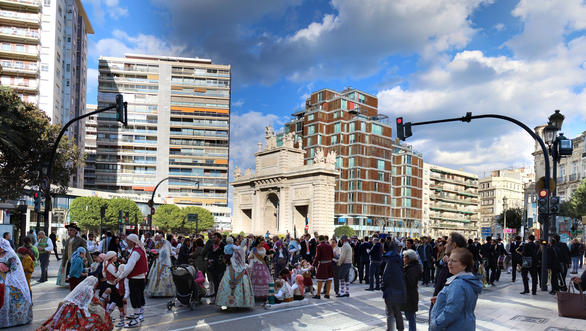 Puerta del Mar de Javier Goerlich Lleó (1944-1946) en Valencia durante las Fallas de 2018